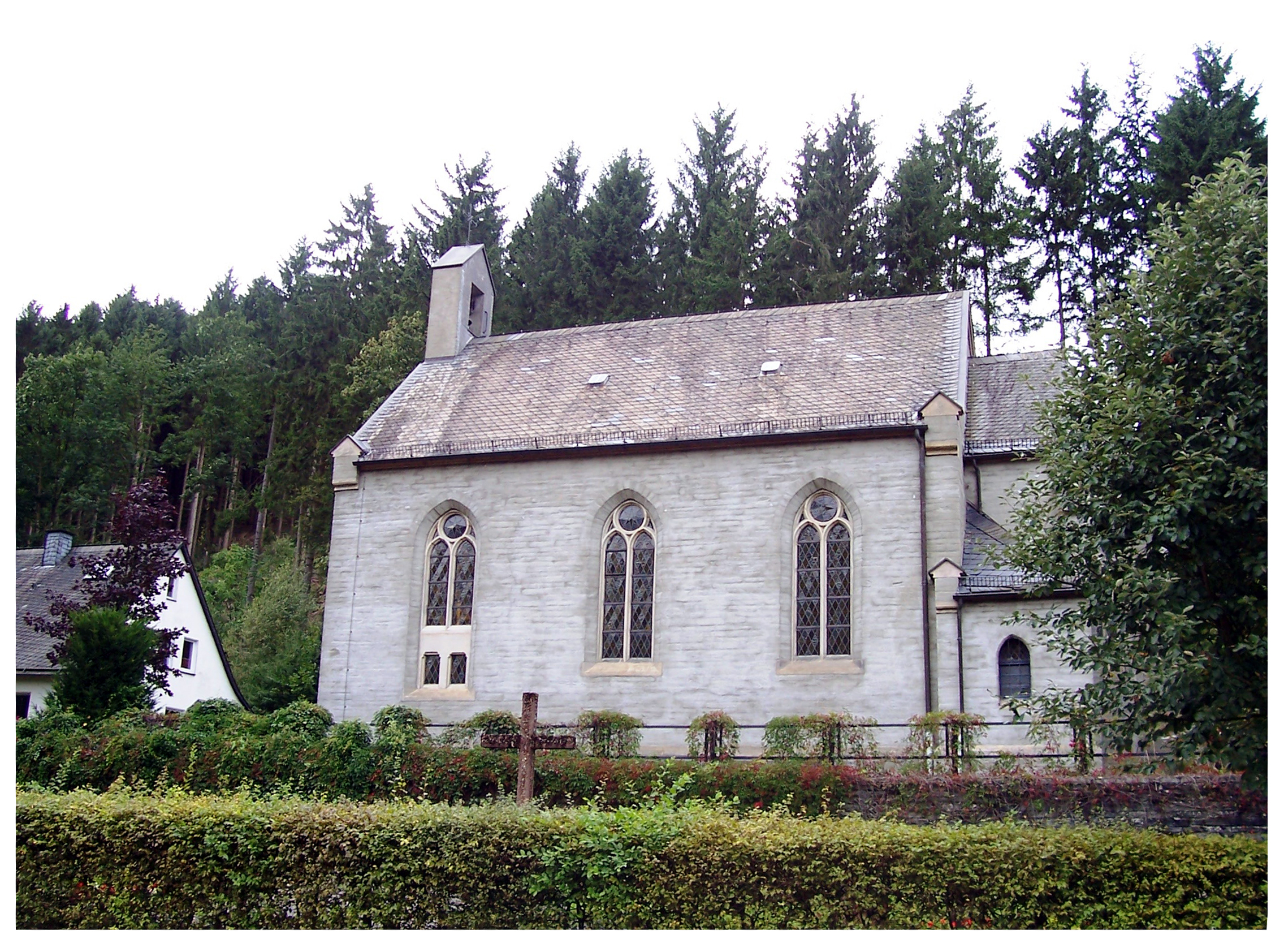 Evangelische Kirche (Petruskirche Ramsbeck) in Bestwig-Ramsbeck.